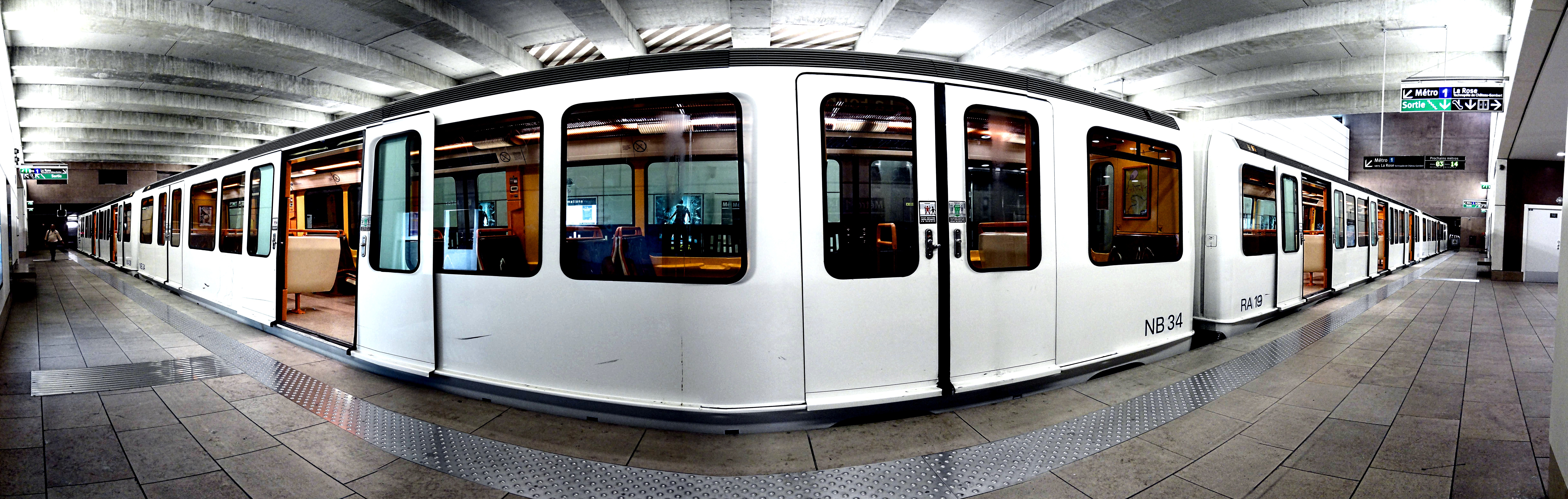 Station de métro "La Fourragère" à Marseille